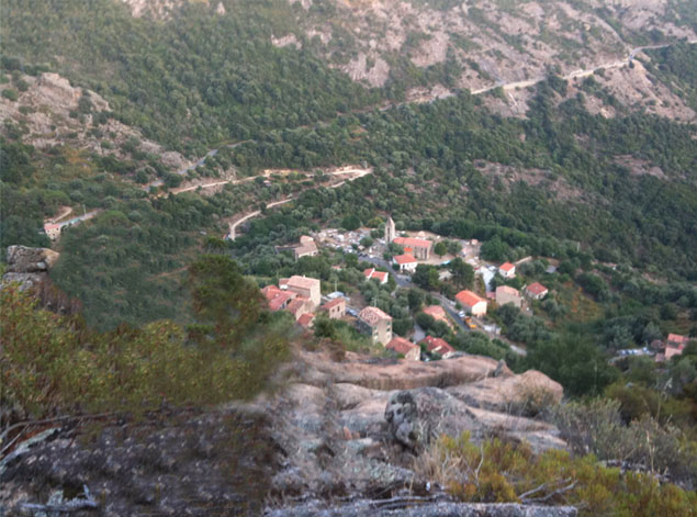 Vue du village depuis les hauteurs